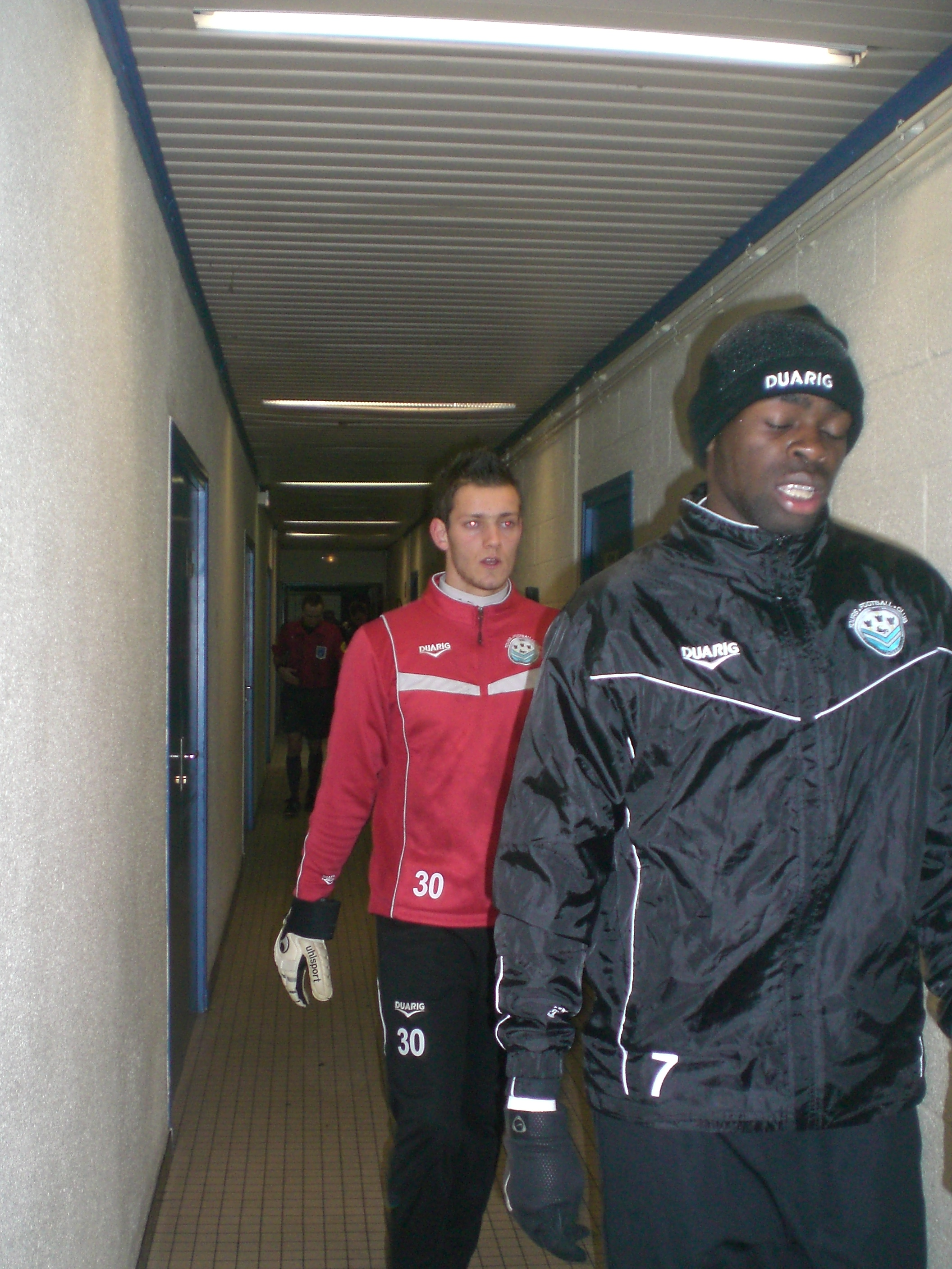 Prince Oniangue (au premier plan) et Benjamin Leroy (second plan) dans le vestiaire lors du match Avion/Tours pour le septième tour de la Coupe de France de Football 2011-2012